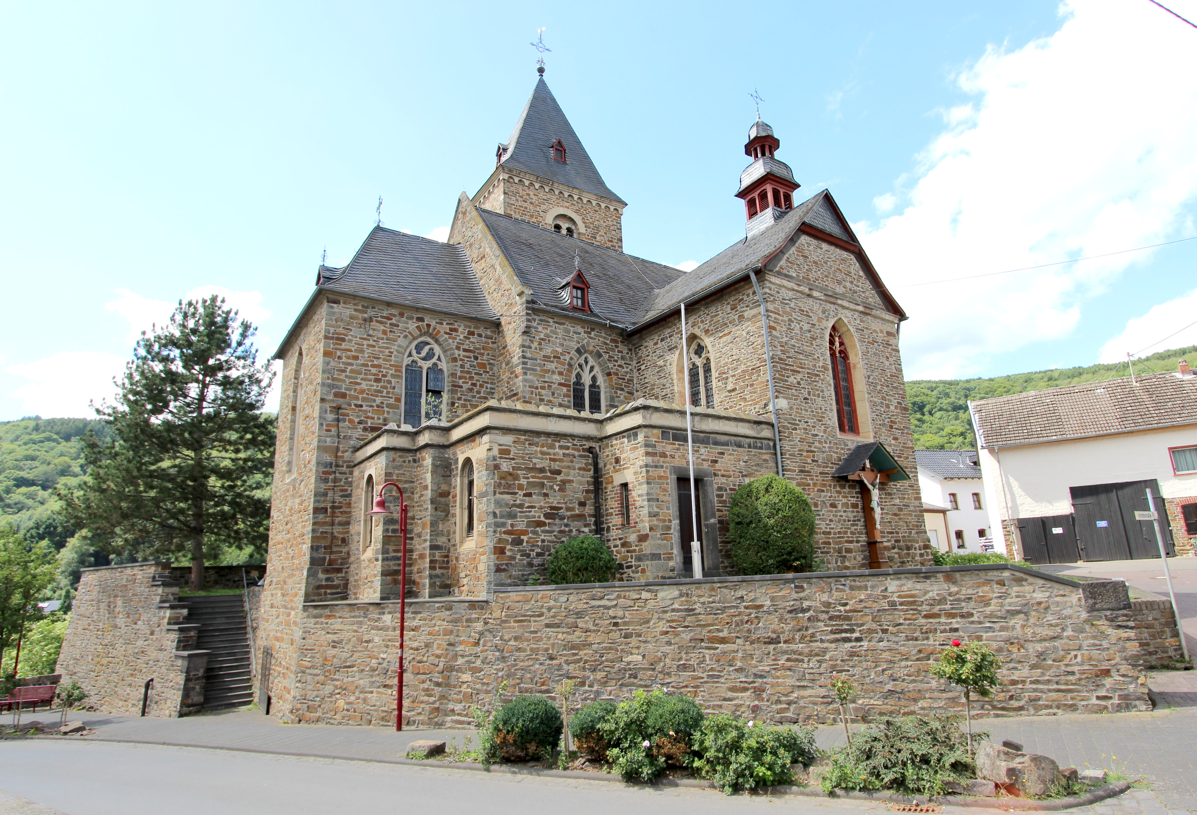 53506 Hönningen, Kirchstraße 3. Untergeschoss des Westturms und untere Mauerpartien des Chors aus der ersten Hälfte des 13. Jahrhunderts, Chor 1494 erhöht, 1508 verändert, zweischiffiges Langhaus, 1524, Querschiff des neugotischen Bruchsteinsaalbaus, 1884/85, Architekt Lambert von Fisenne, Gelsenkirchen. Aufnahme von 2017.